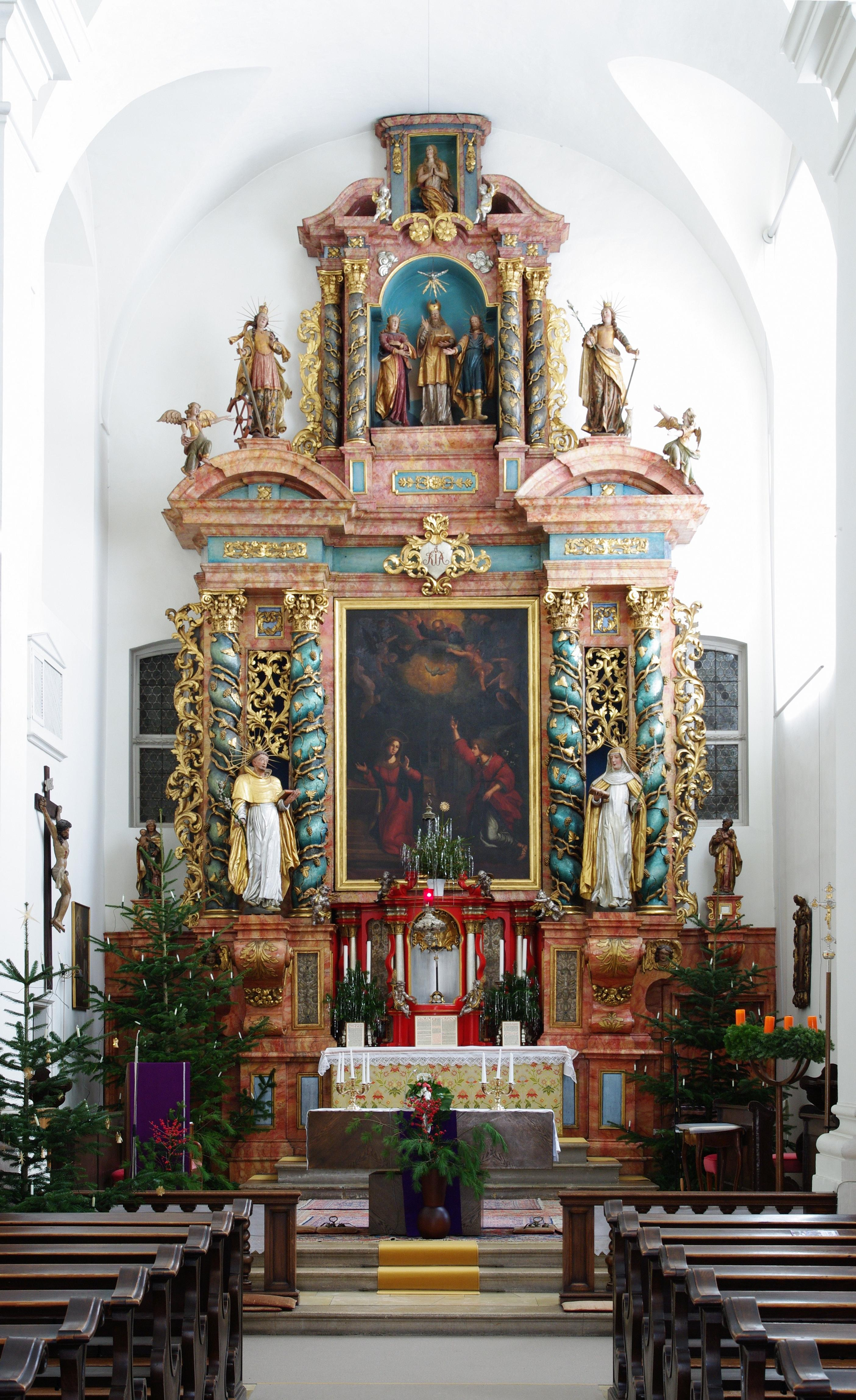 Der Altar